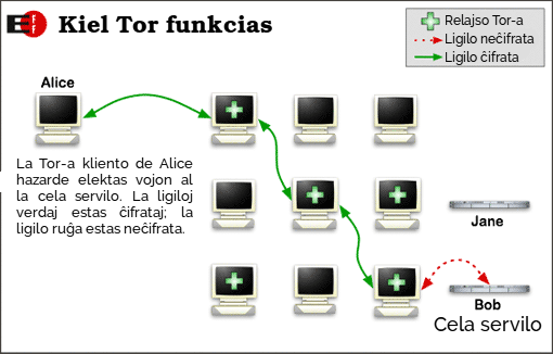 Kiel la Tor-a reto funkcias, laŭ la EFF, tradukita el la angla de la originala versio tie-ĉi